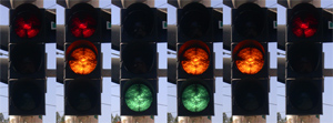 Ampel in Dresden, Kreuzung Königsbrücker Str./Bischofsweg. Ein guter Freund aus dem Raum Dresden hat mich zu dieser Ampel geführt, kurz bevor sie RiLSA-konform umgerüstet wurde.